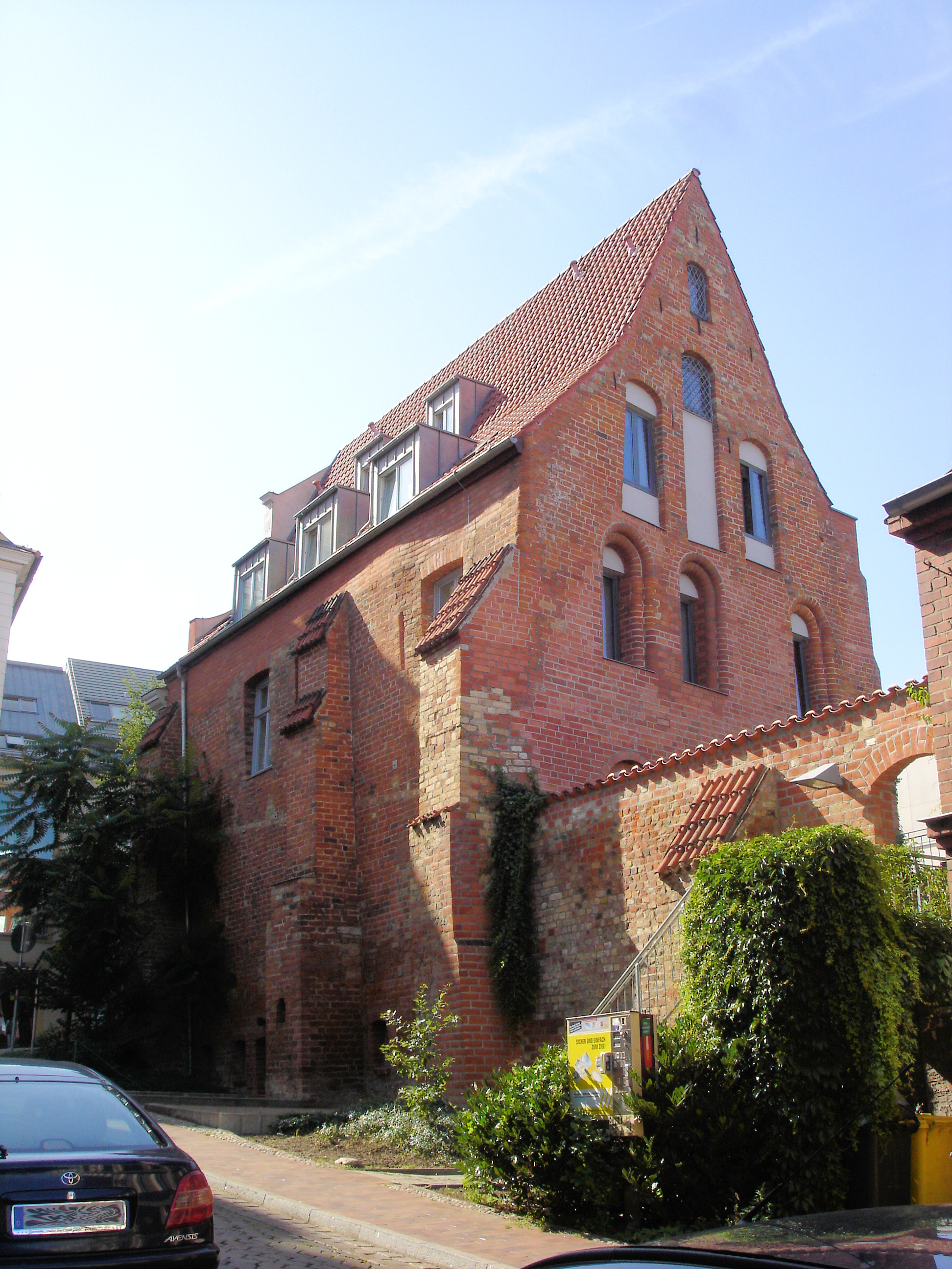 ehemaliges Gasthaus "Vater Rhein" Große Scharrenstr./An der Hege